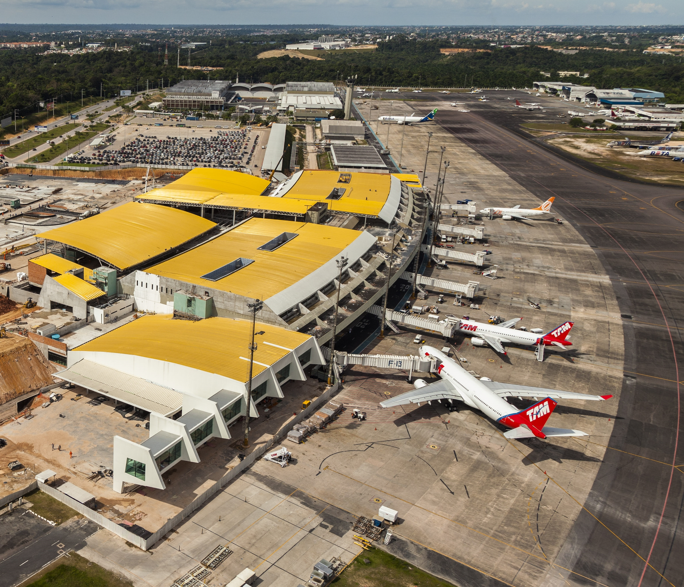 Aeroporto Internacional de Manaus em obras de ampliação e modernização.